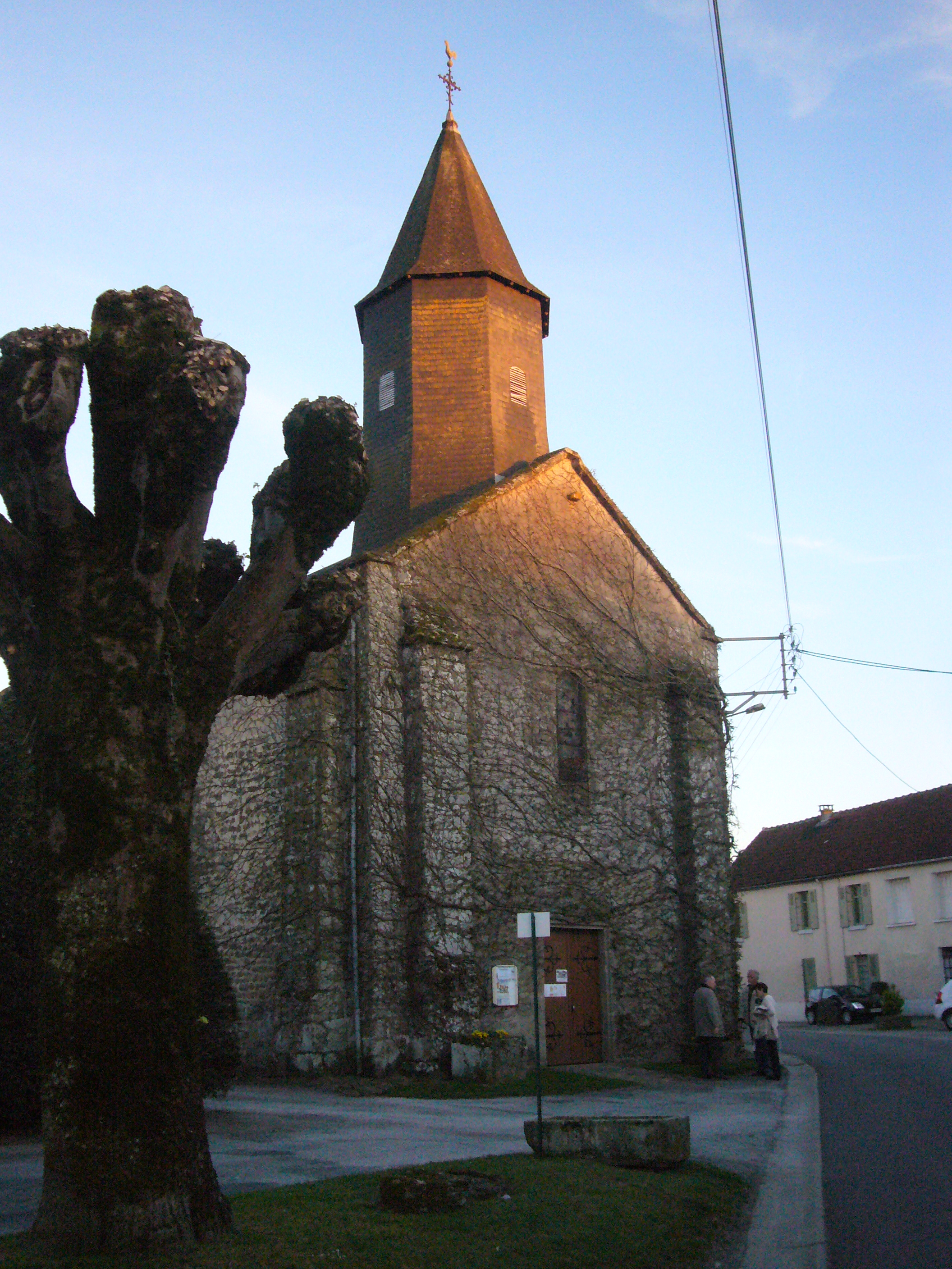 L'église de Saint-Sornin-Leulac (Haute-Vienne, France)